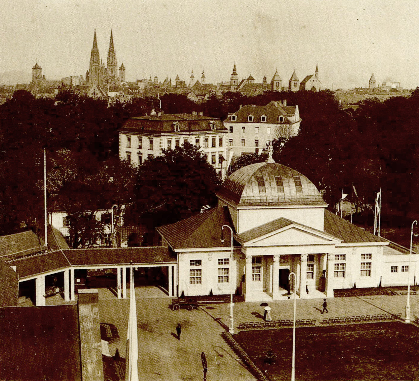 Das heutige Kunstforum Ostdeutsche Galerie in Regensburg auf einem Bild während der Oberpfälzischen Kreisausstellung 1910